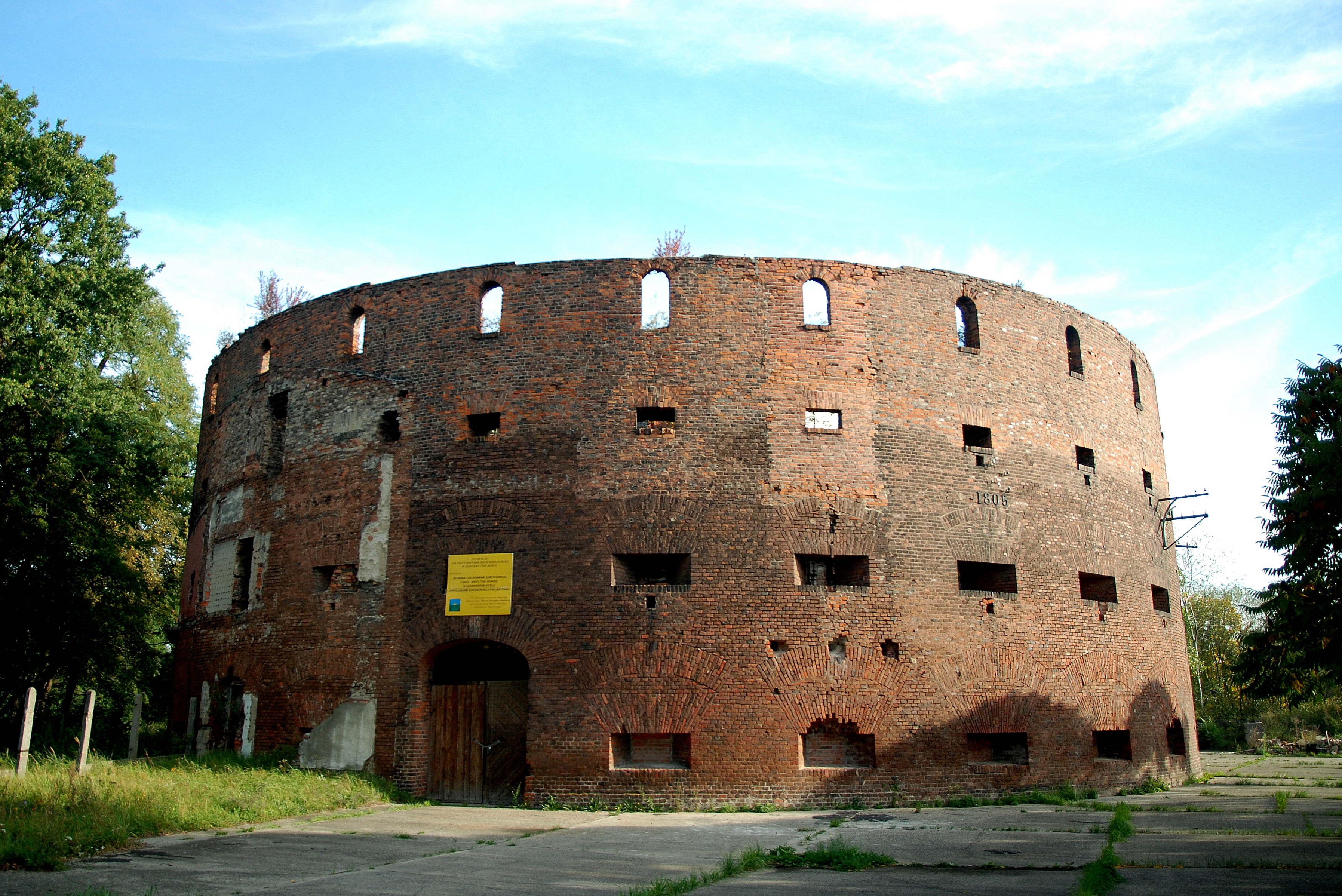 Kędzierzyn-Koźle ul. Portowa fort tzw. Rondel OP